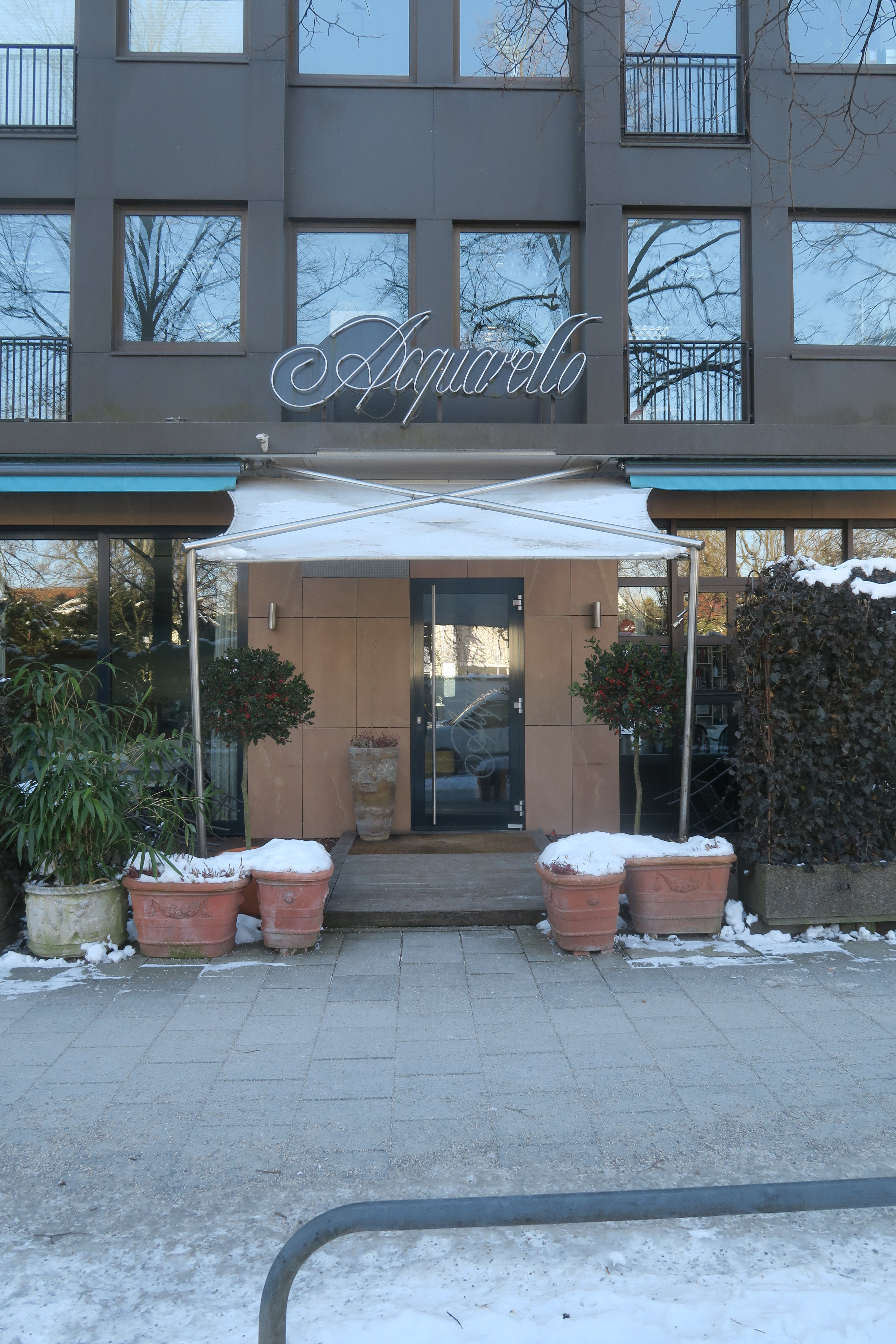 Restaurant Acquarello, München, Mühlbaurstraße 36